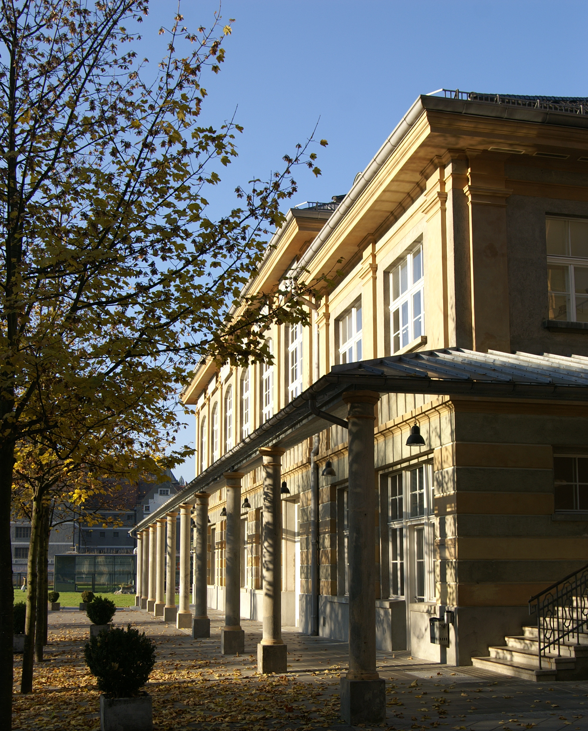 das Stella Matutina, heute Landeskonservatorium wurde 1899 durch Peter Hutter in Feldkirch, Vorarlberg erbaut.